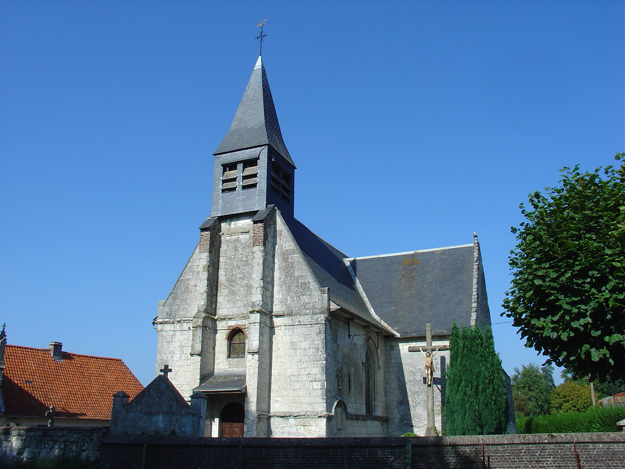 Église de Conteville-en-Ternois